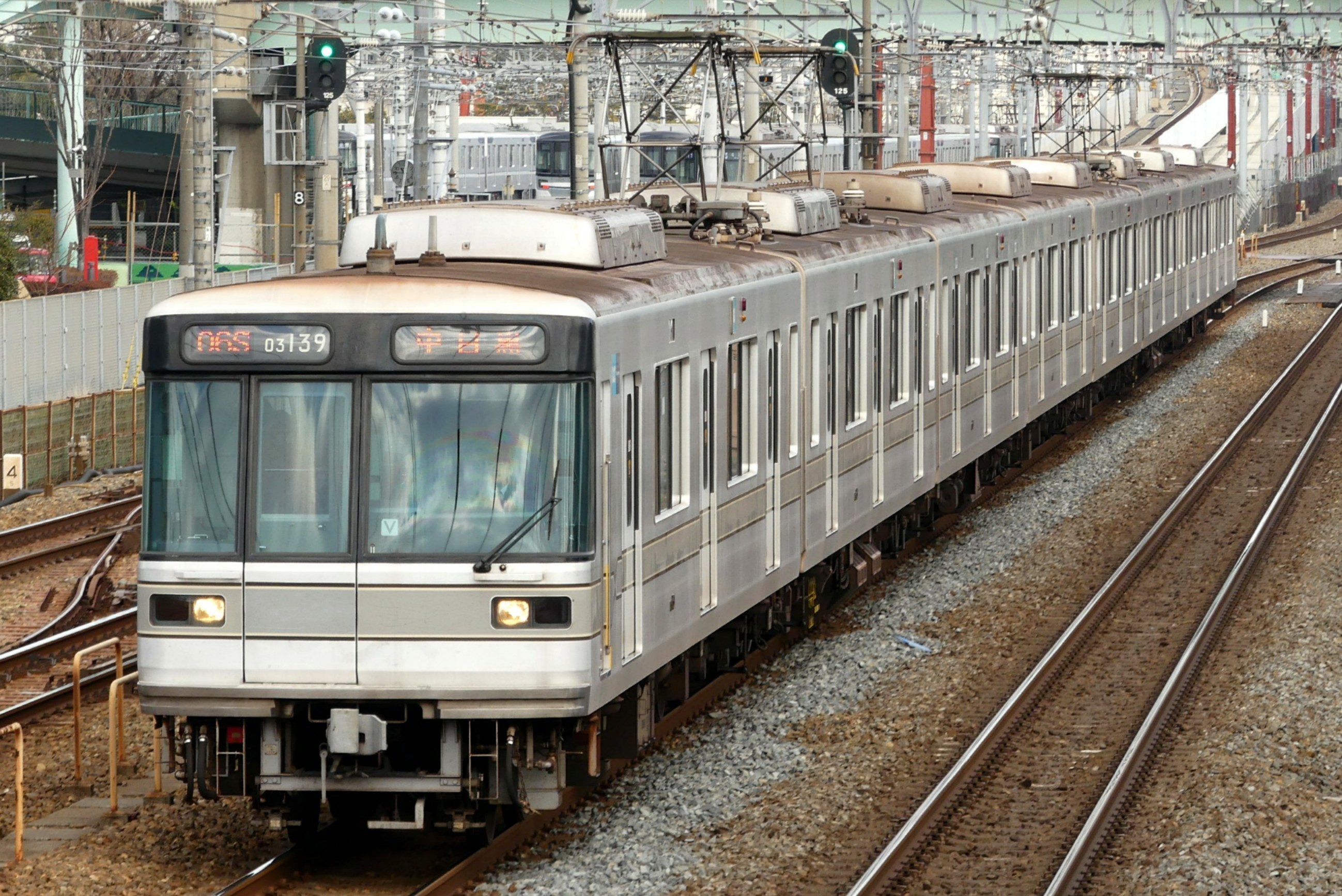 日比谷線03系電車